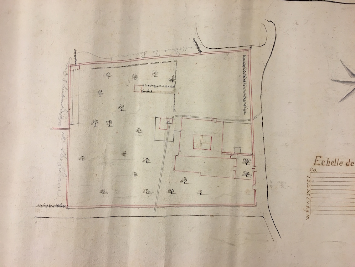 Photographie du plan cadastral roulé n°32. Archives communales de Delémont